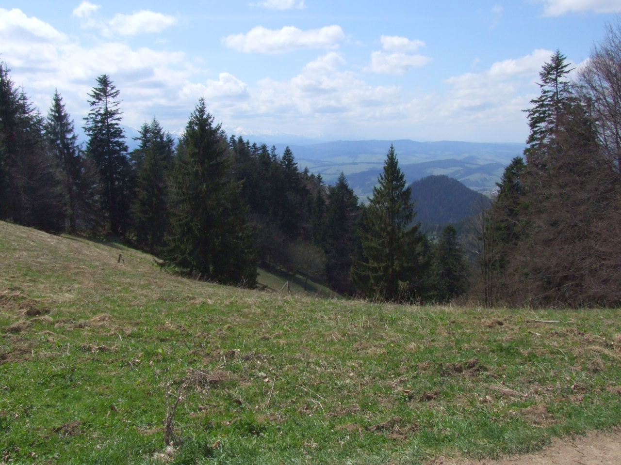 Polana Pieniny